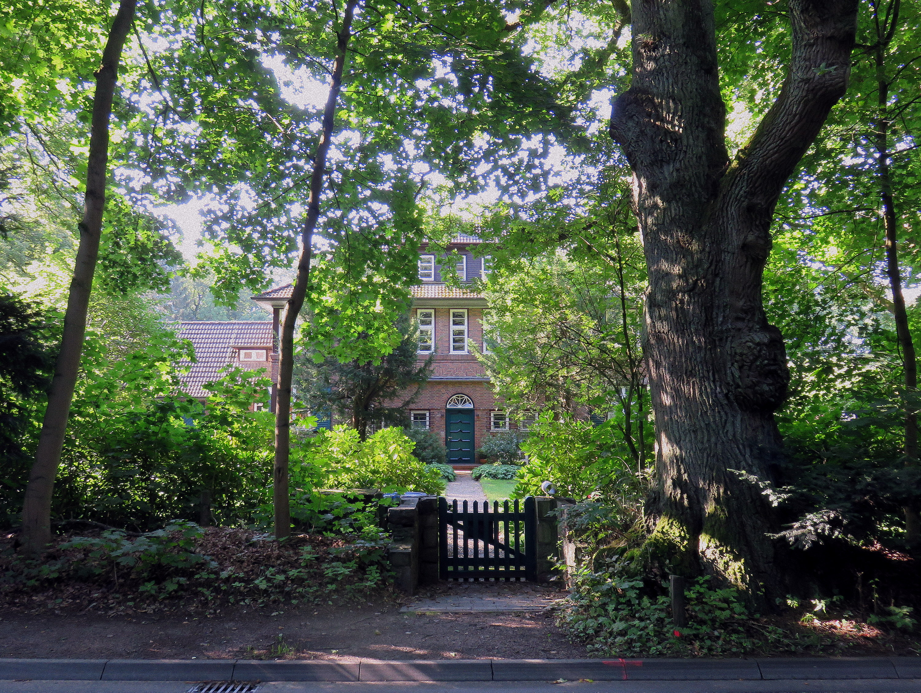 Landhaus Saseler Weg 53 in Hamburg-Volksdorf, erbaut 1925/1926 von Architekt Fritz Höger. This is a photograph of an architectural monument.